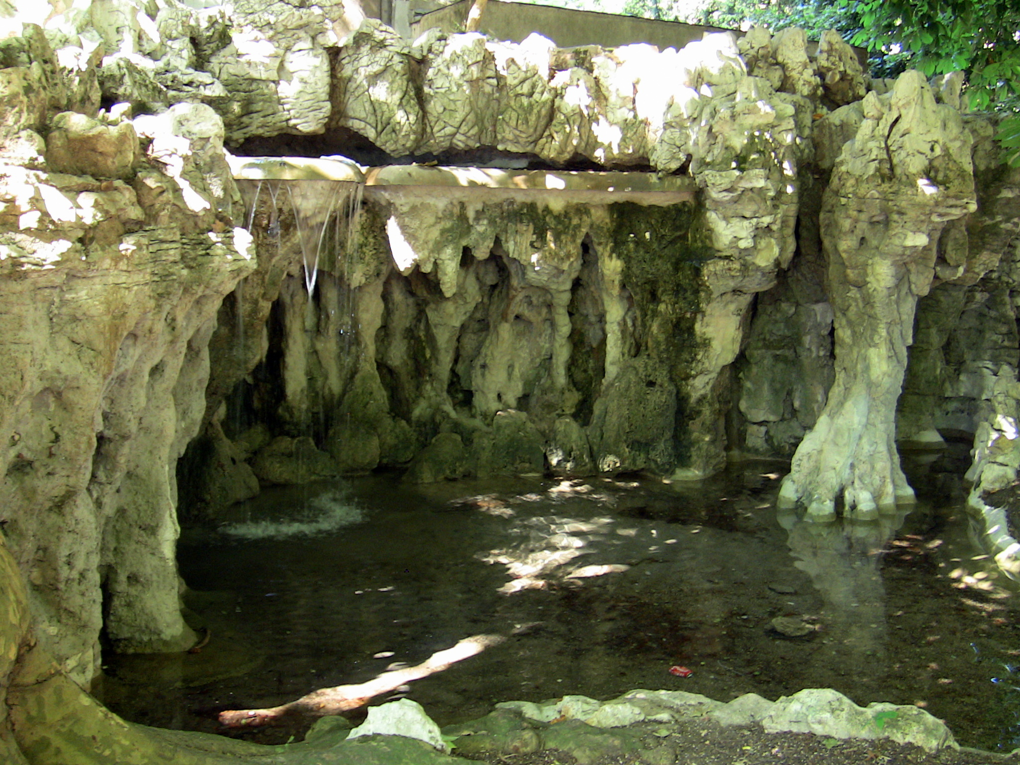 La cascade Granvelle de Besançon.